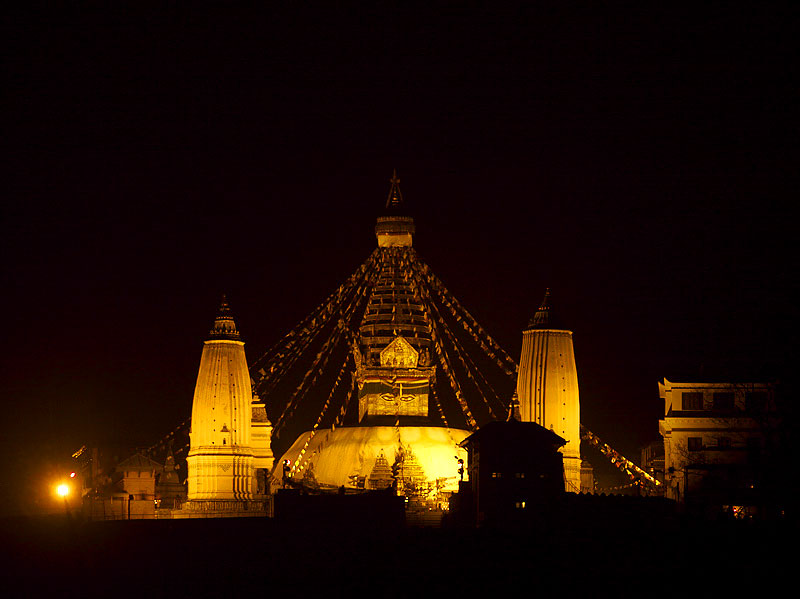 Swayambhunath at night, Kathmandu, Nepal